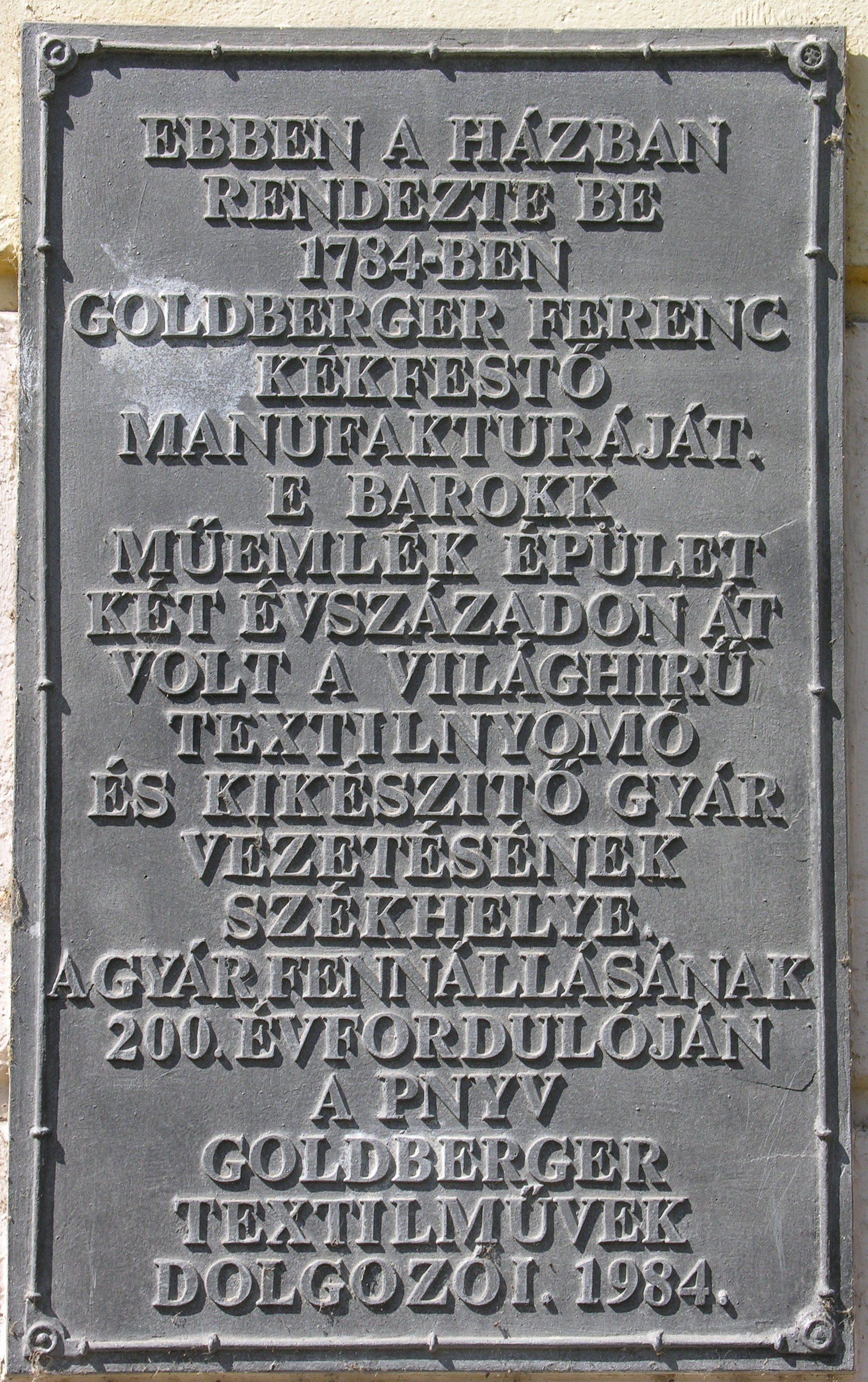 Goldberger Ferenc emléktábla a budapesti Textilmúzeumban, Budapest, III., Lajos utca 138.